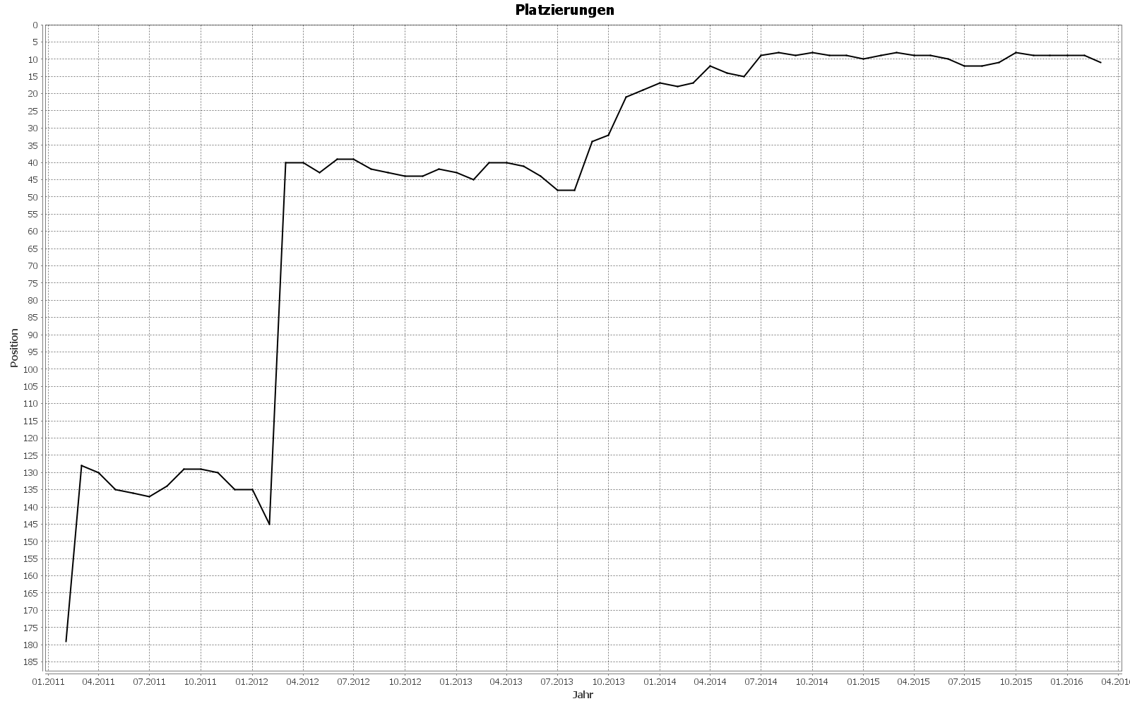 Verlauf der WRL